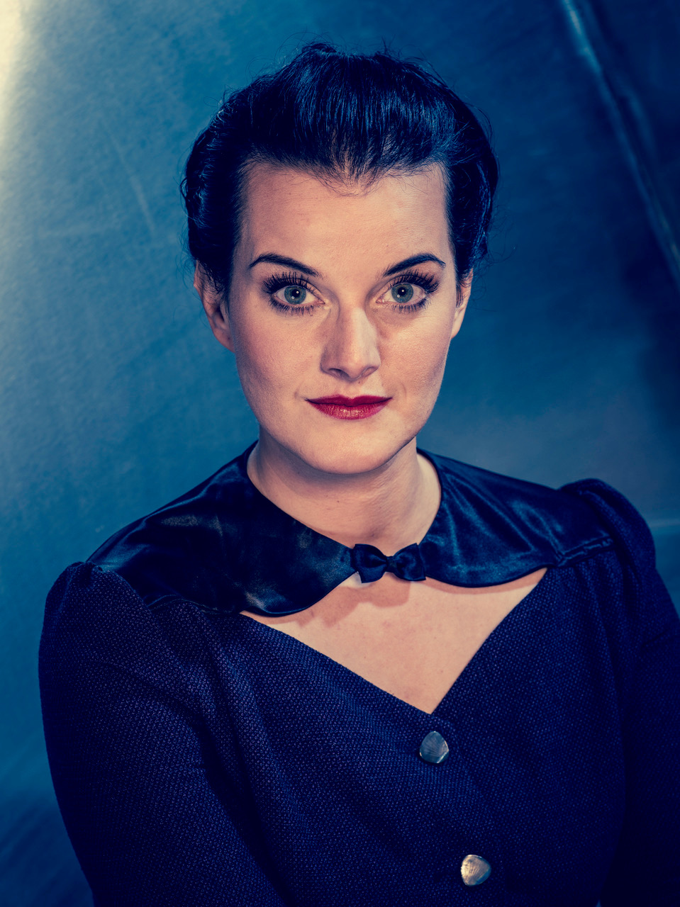 Britta Habekost